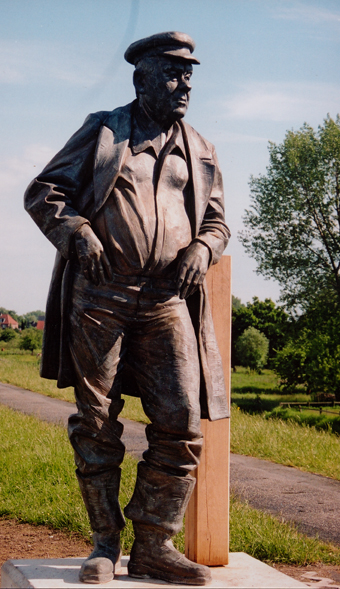 Der 2,20 Meter große Deichgraf von Bildhauer Carsten Eggers wacht auf der Elbinsel Krautsand über den Deich